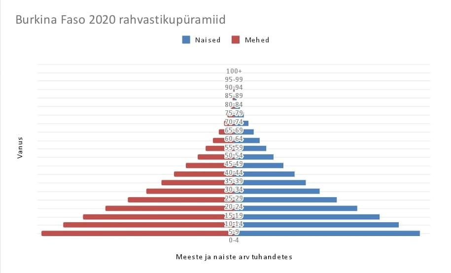 Saab vaadata, kui palju mehi ja naisi on erinevates vanuseklassides